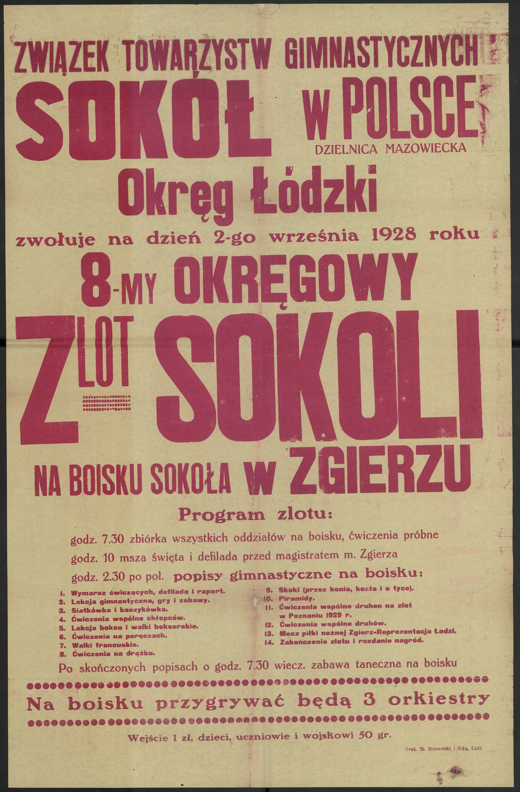 Związek Towarzystw Gimnastycznych Sokół w Polsce Dzielnica Mazowiecka Okręg Łódzki zwołuje na dzień 2-go września 1928 roku 8-my Okręgowy Zlot Sokoli na boisku Sokoła w Zgierzu